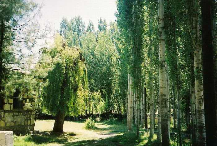 kişisel resim